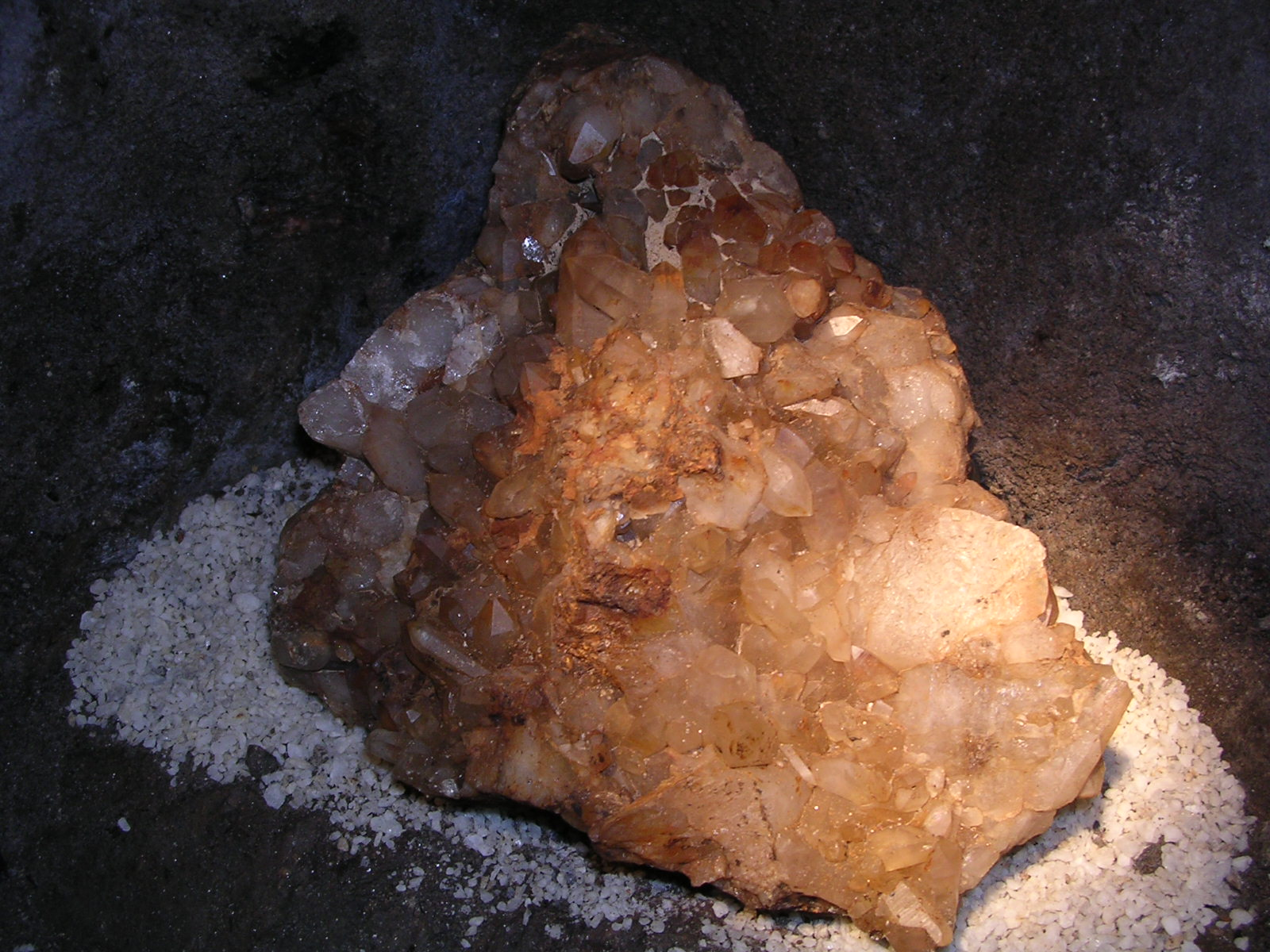 Štola Starý Martin, prohlídková štola, Horní Krupka